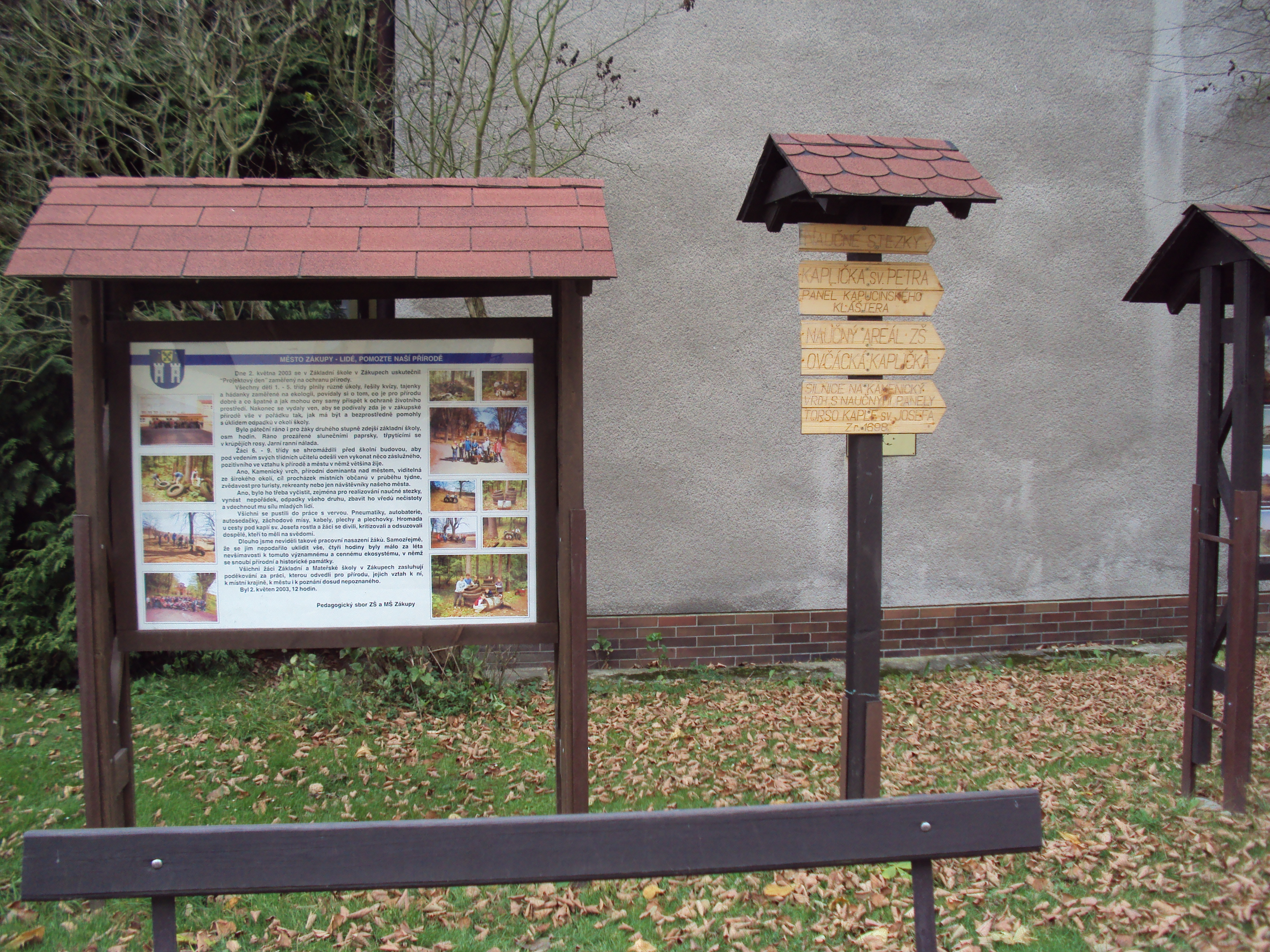 Začátek Naučné stezky je u základní školy v Zákupech